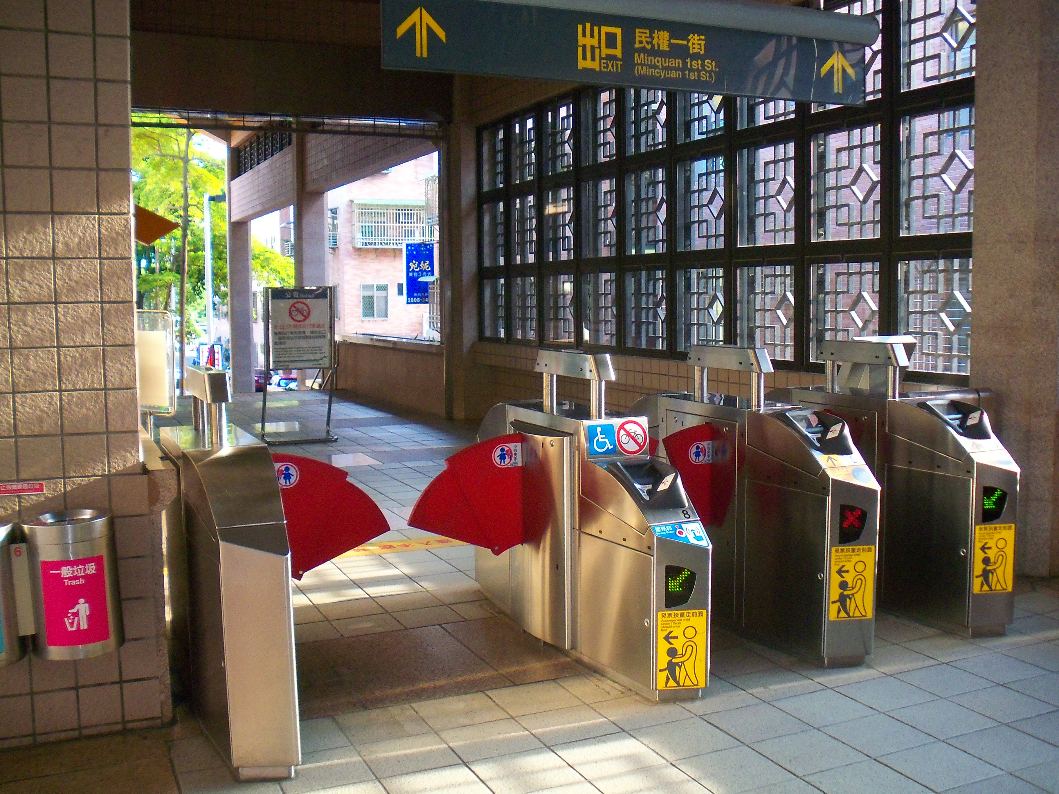 台北捷運淡水線竹囲駅2号出口改札前。